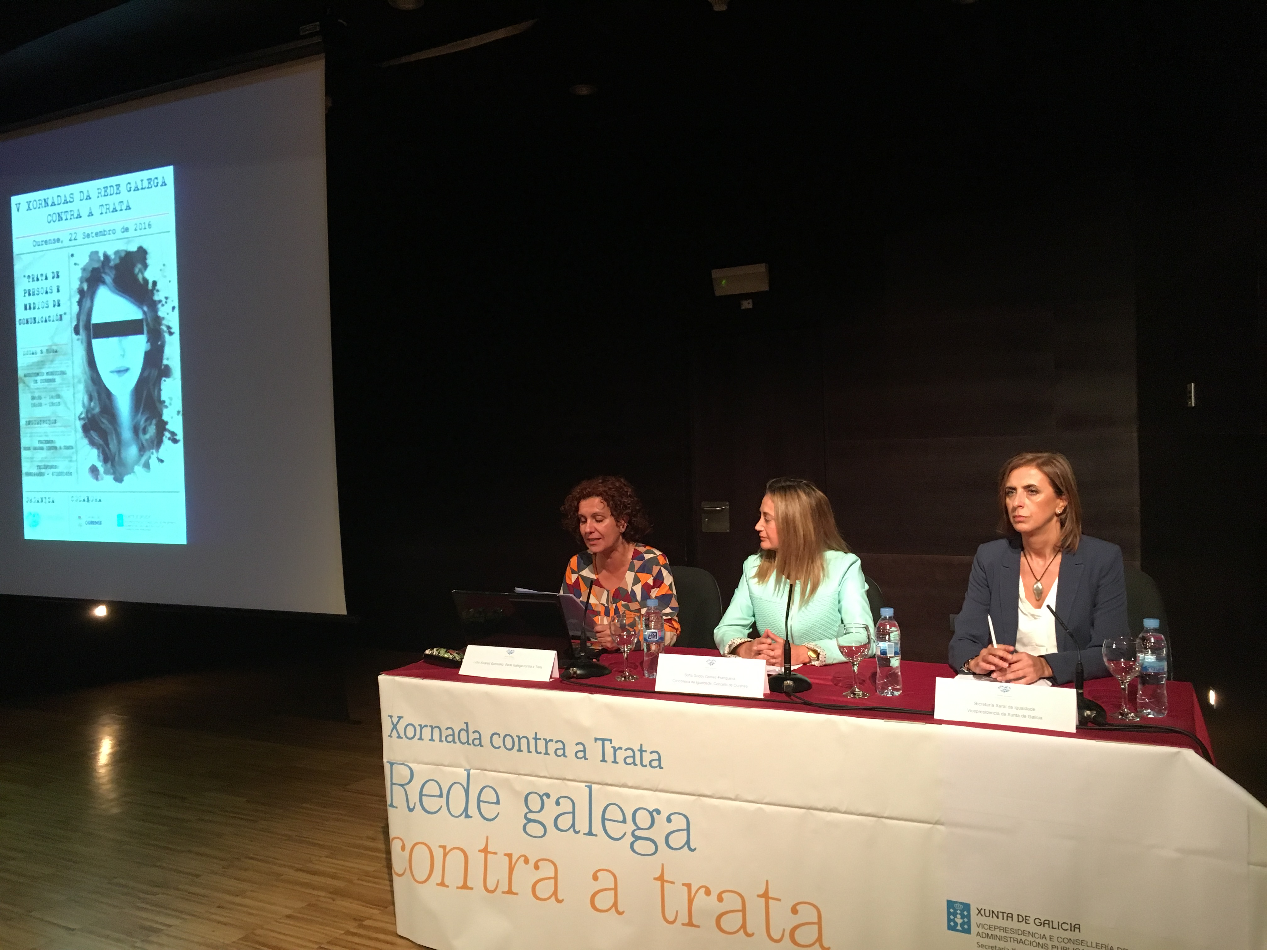 Jornada contra la trata en Ourense Dia internacional contra la trata 2016